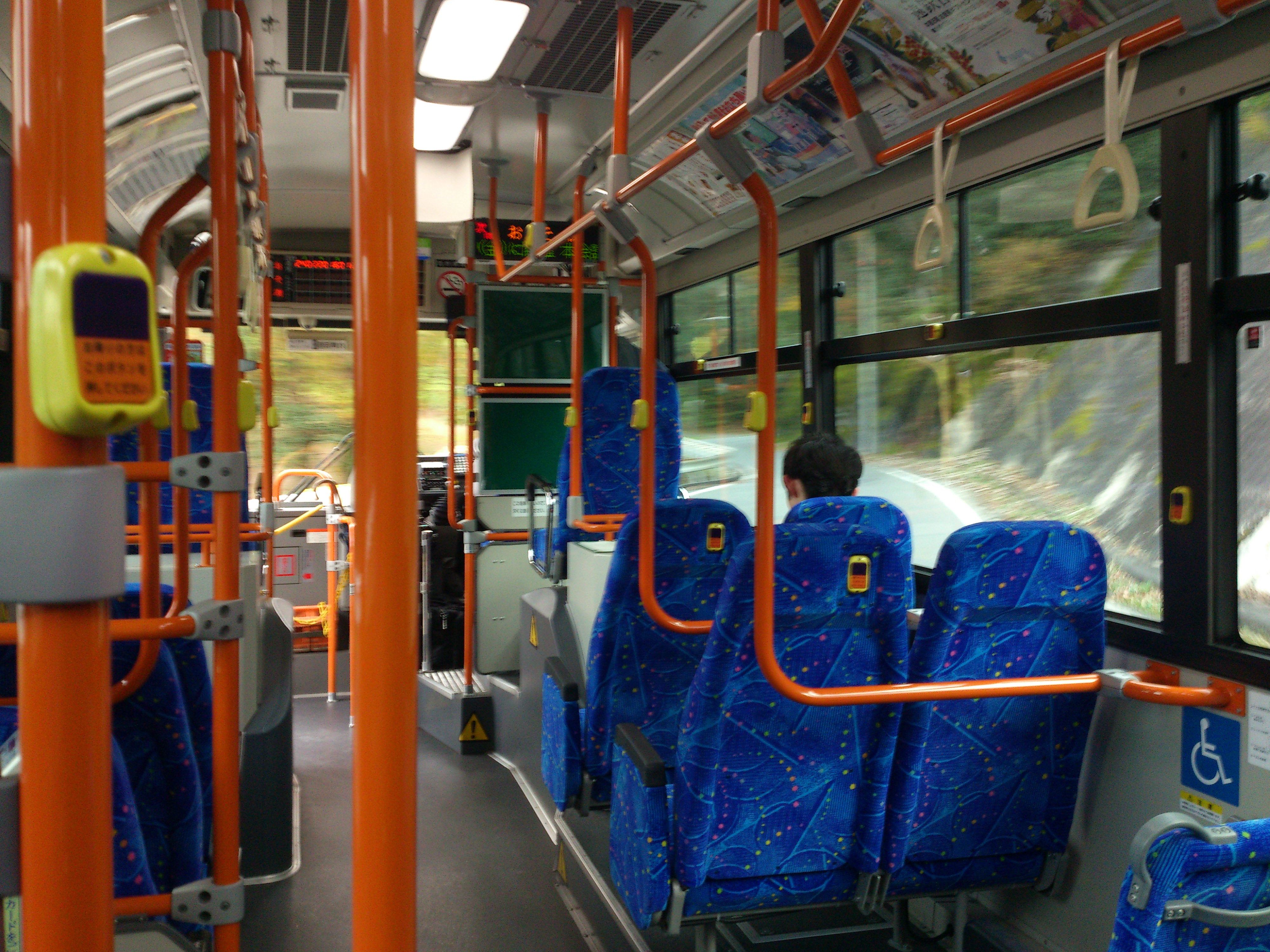 遠鉄バス車内